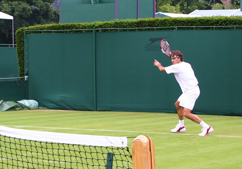 Roger Federer at Wimbledon, 2005 Photo by Alexander Smotrov